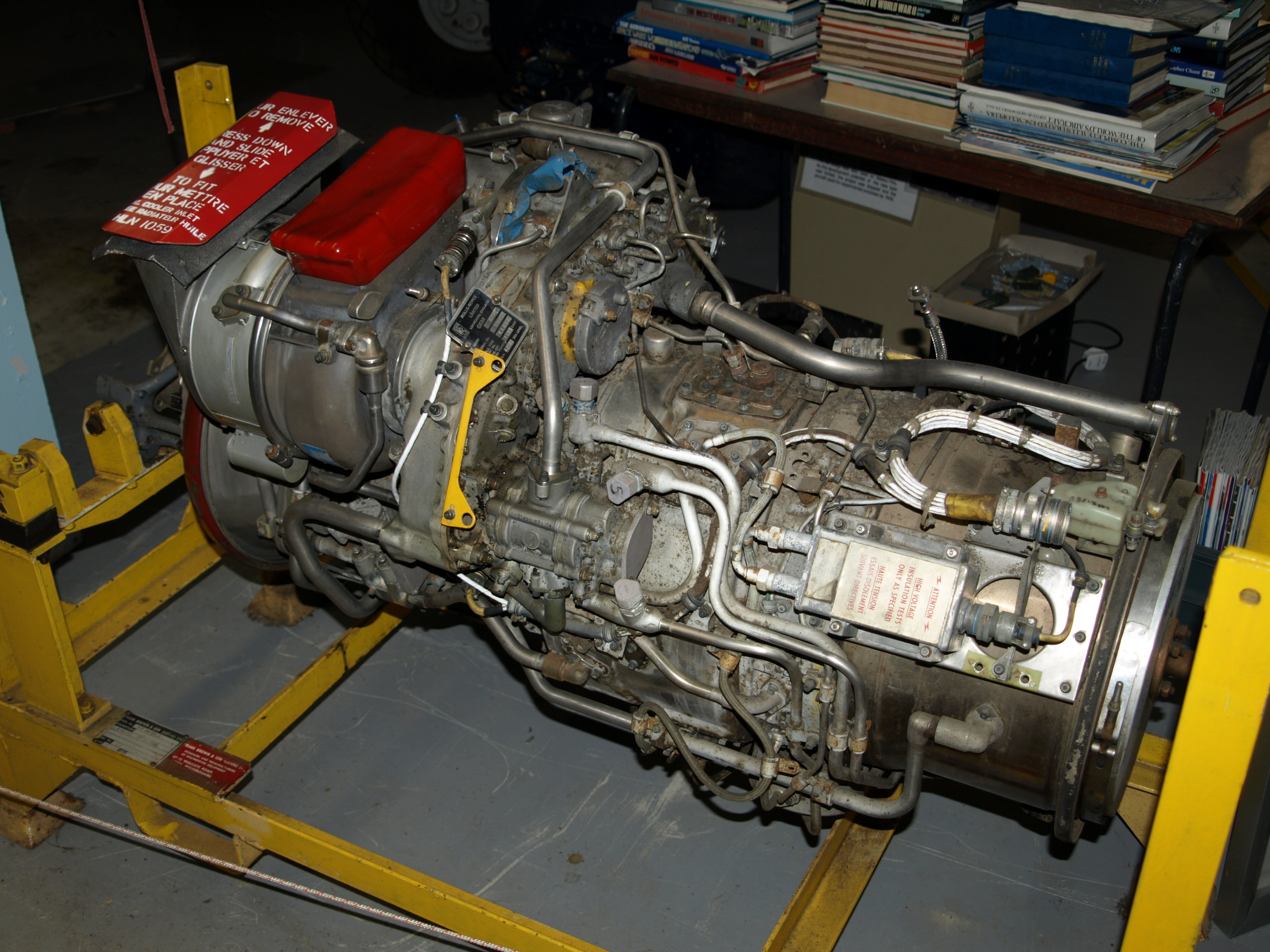 Rolls-Royce Gem turboshaft engine